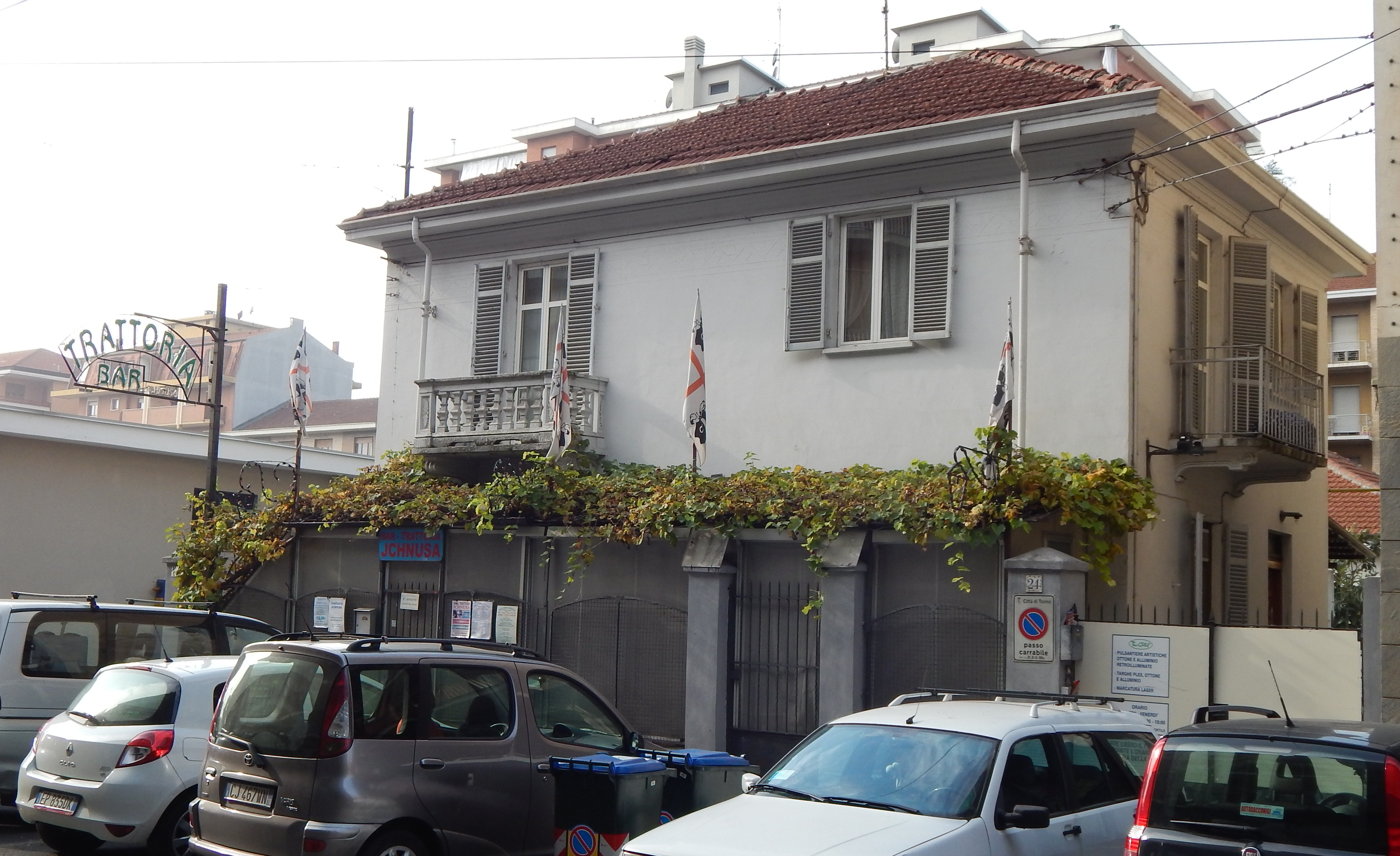 Una veduta di Borgata Lesna